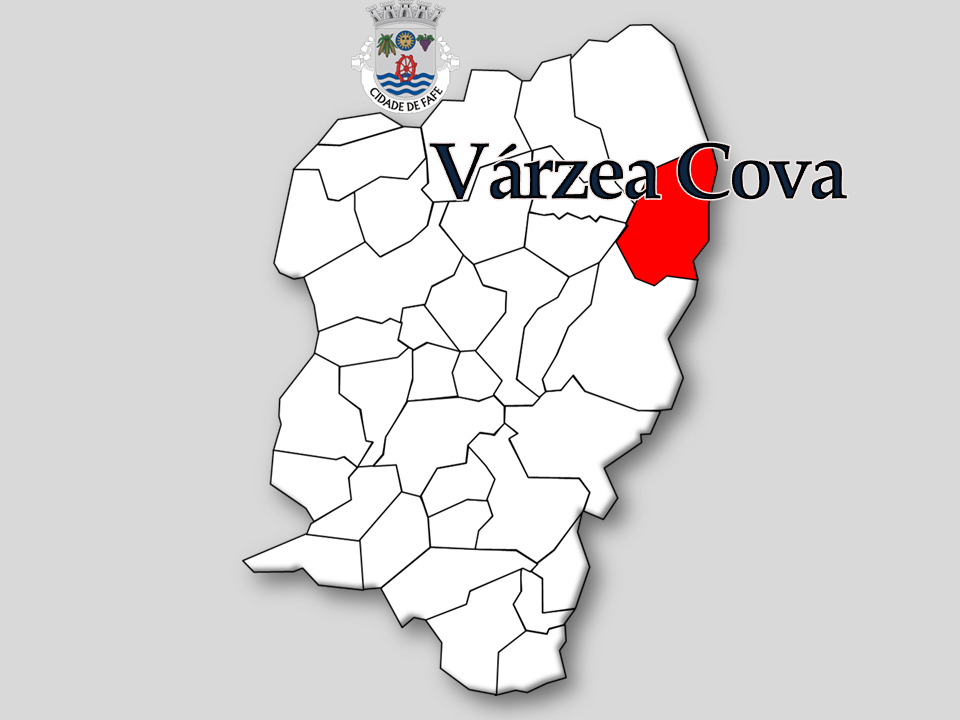 Censos 1864/2011